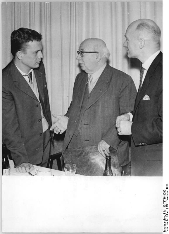 Berlin, Pressekonferenz, Hacks, Zweig, Weber Zentralbild-Kohls 13.12.1960 Internationale Pressekonferenz über Hamburger Verbot Der wahre Sachverhalt der empörenden Vorgänge beim Verbot der 12. Generalvorsammlung des deutschen Pen-Zentrums Ost und West wurden am 13.12.1960 auf einer Pressekonferenz im Berliner Presseklub bekanntgegeben. Hervorragende Persönlichkeiten wie Prof. Alfred Kurella, Kandidat des Politbüros des ZN der SED, Schriftsteller Arnold Zweig, Ludwig Rein, Brunn Apitz u.a. hatten sich eingefunden. UBz: Schriftsteller Arnold Zweig im Gespräch mit dem jungen Schriftsteller Dr. Peter Hacks (links) und dem Herausgeber der Münchner Zeitschrift "Parorama", Karl-August Weber (rechts). Abgebildete Personen: Hacks, Peter Dr.: Schriftsteller, DDR Weber, Karl-August: Herausgeber der Münchner Zeitschrift Panorama, Bundesrepublik Deutschland Zweig, Arnold Prof. Dr.: Schriftsteller, Ehrenpräsident der Akademie der Künste (AdK), Volkskammerabgeordneter, Präsident des Deutschen PEN-Zentrums Ost und West, DDR